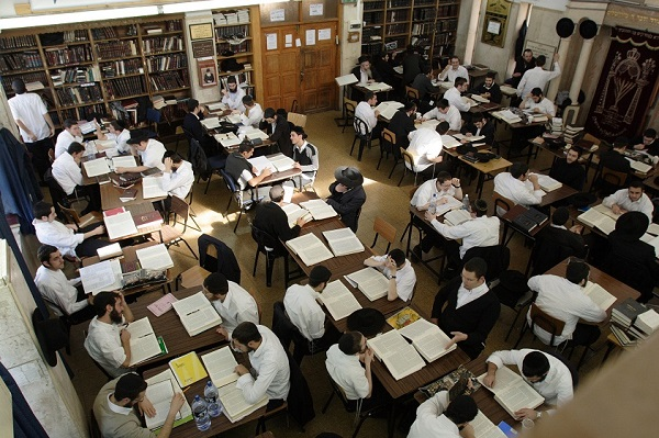 זאל ישיבת תורת אמת